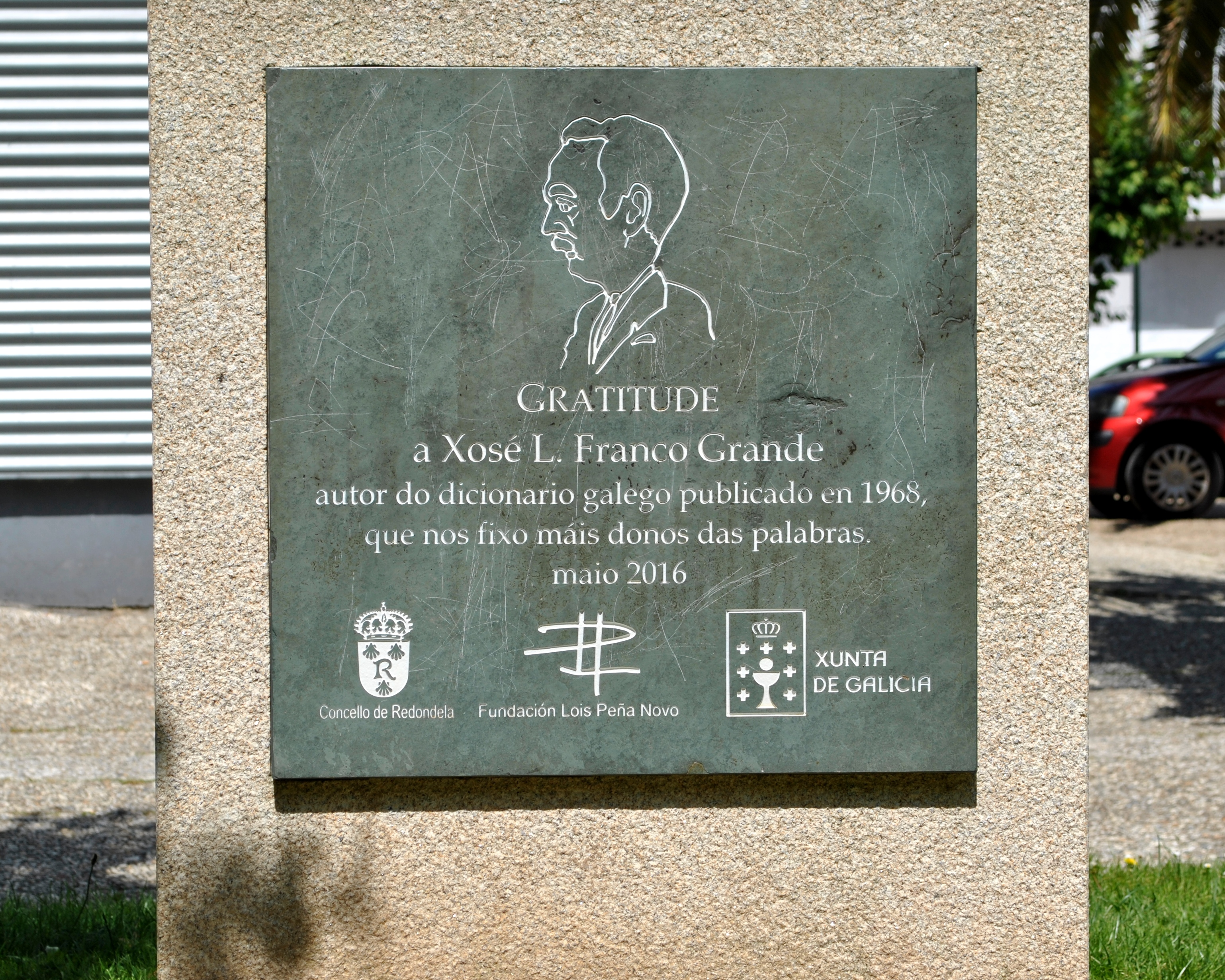 No ano 2016 a Fundación L. Peña Novo, a Xunta de Galicia e o Concello de Redondela fixéronlle unha homenaxe a Xosé Luís Franco Grande e instalaron unha placa conmemorativa.[1]